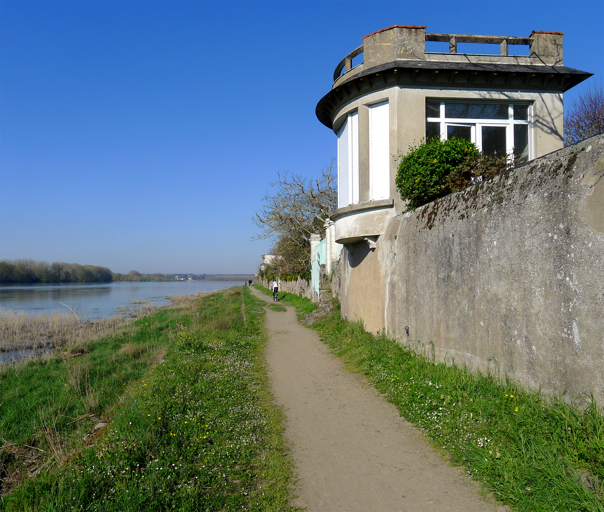 Sainte-Gemmes-sur-Loire (cabane le long de la Loire) - Maine-et-Loire, France